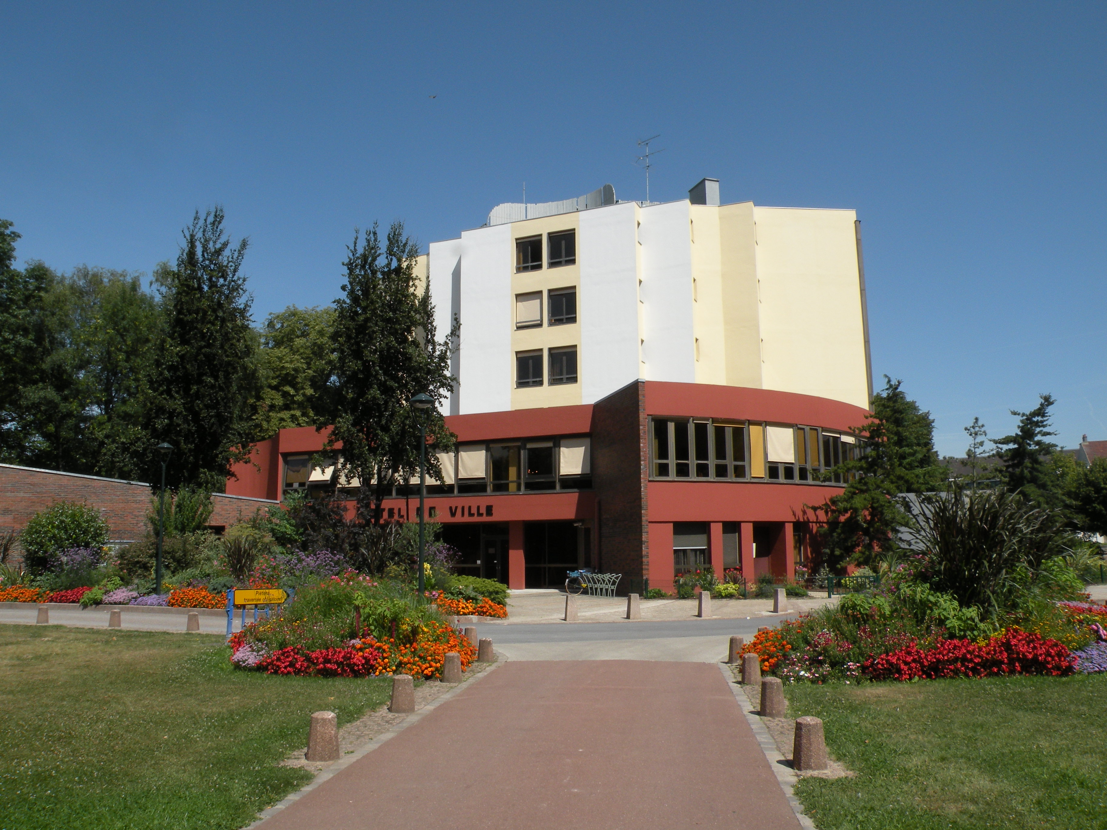 mairie de Saint-Ouen-l'Aumône